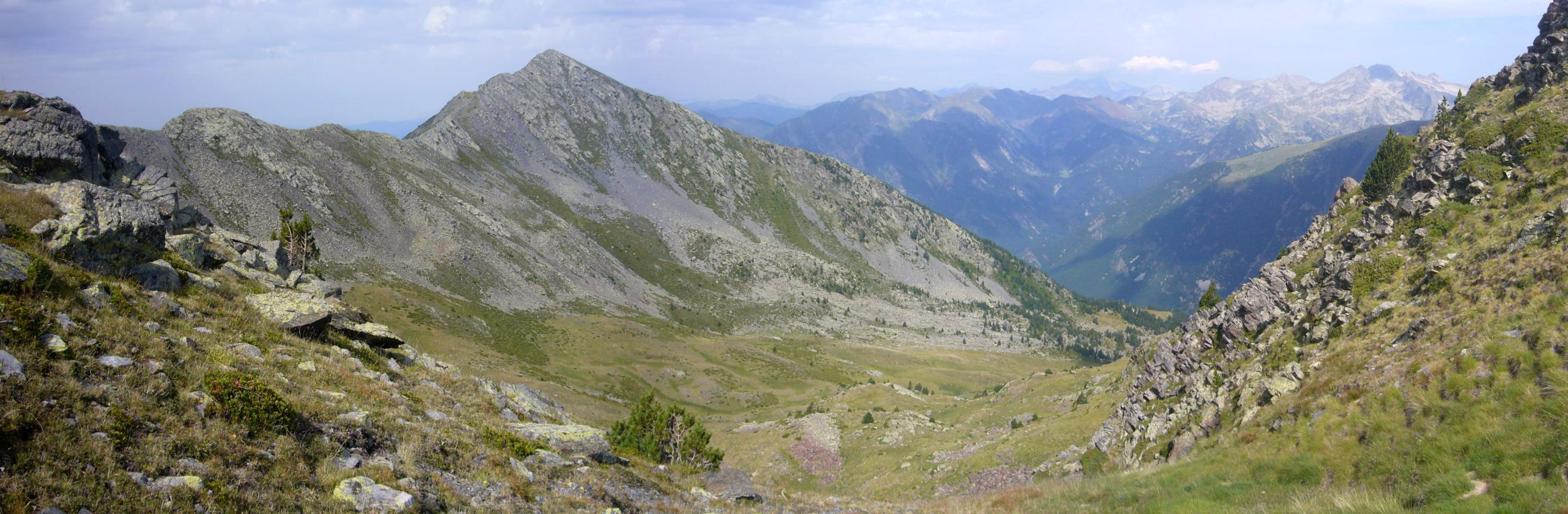 Cometes de Casesnoves i Tuc de la Comamarja; la Vall de Boí, Alta Ribagorça, Catalunya